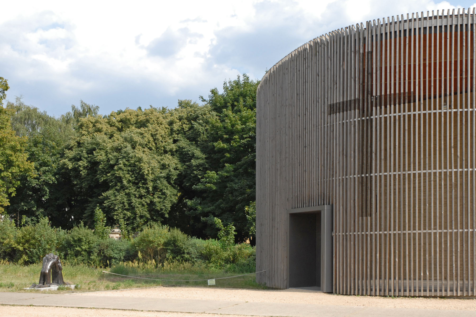 La chapelle de la Réconciliation a été conçue par les architectes Reitermann et Sassenroth. Elle se trouve sur l'emplacement d'une église évangélique détruite par le régime socialiste de RDA en 1985 car elle était située trop près du mur. Le centre d'information du Mur (Dokumentation Berliner Mauer) est situé Bernauer Strasse, une rue coupée en deux par le Mur devenue un symbole. Une portion de Mur de 300 m a été laissée en l'état (deux murs parallèles séparés par un couloir recouvert de sable), deux plaques d'acier perpendiculaires délimitent la partie conservée. Un centre d'information, doté d'une tour d'observation, a été ouvert en face de ce lieu de mémoire.